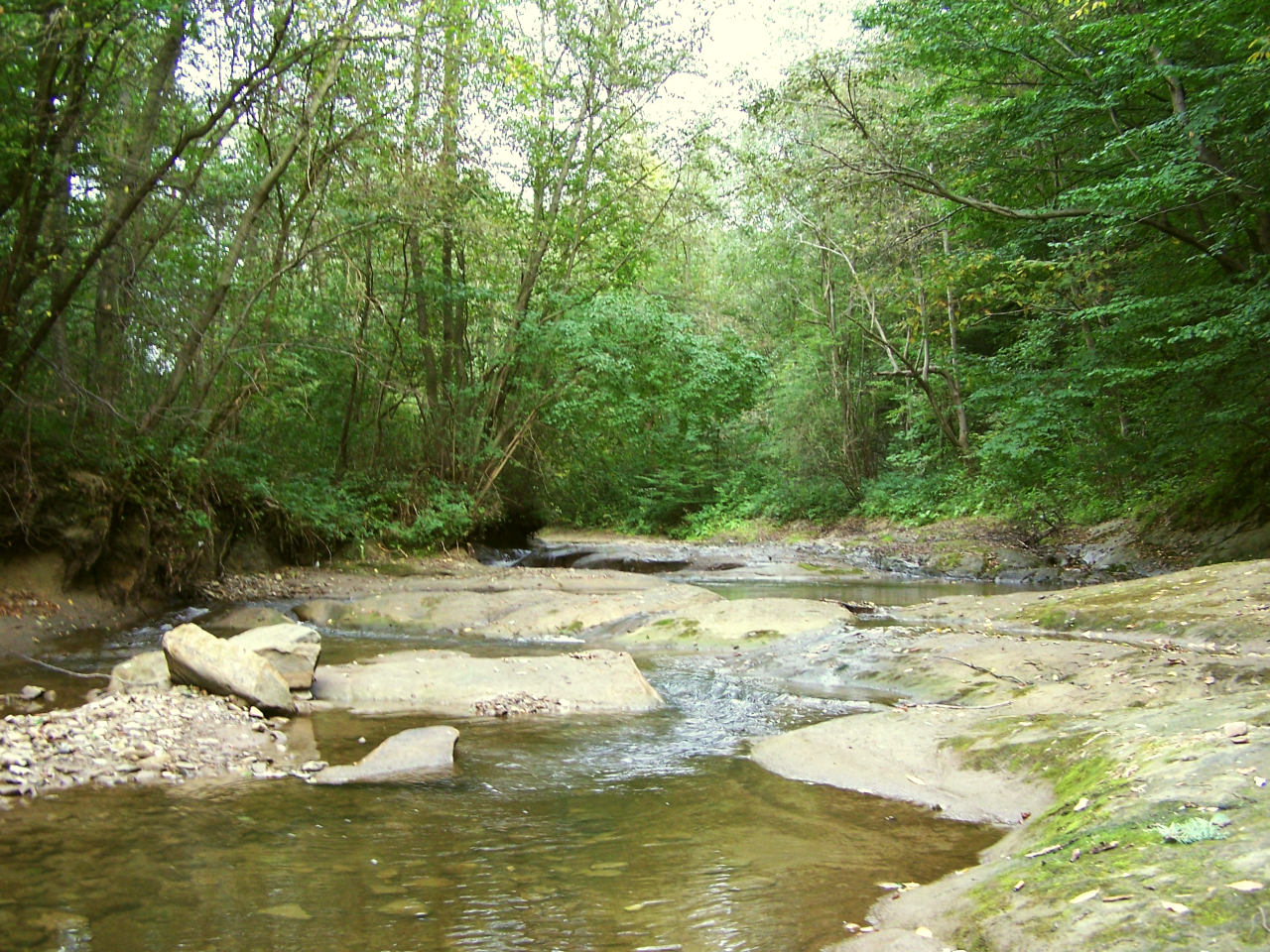 Przeginia (Pogórze Wiśnickie)